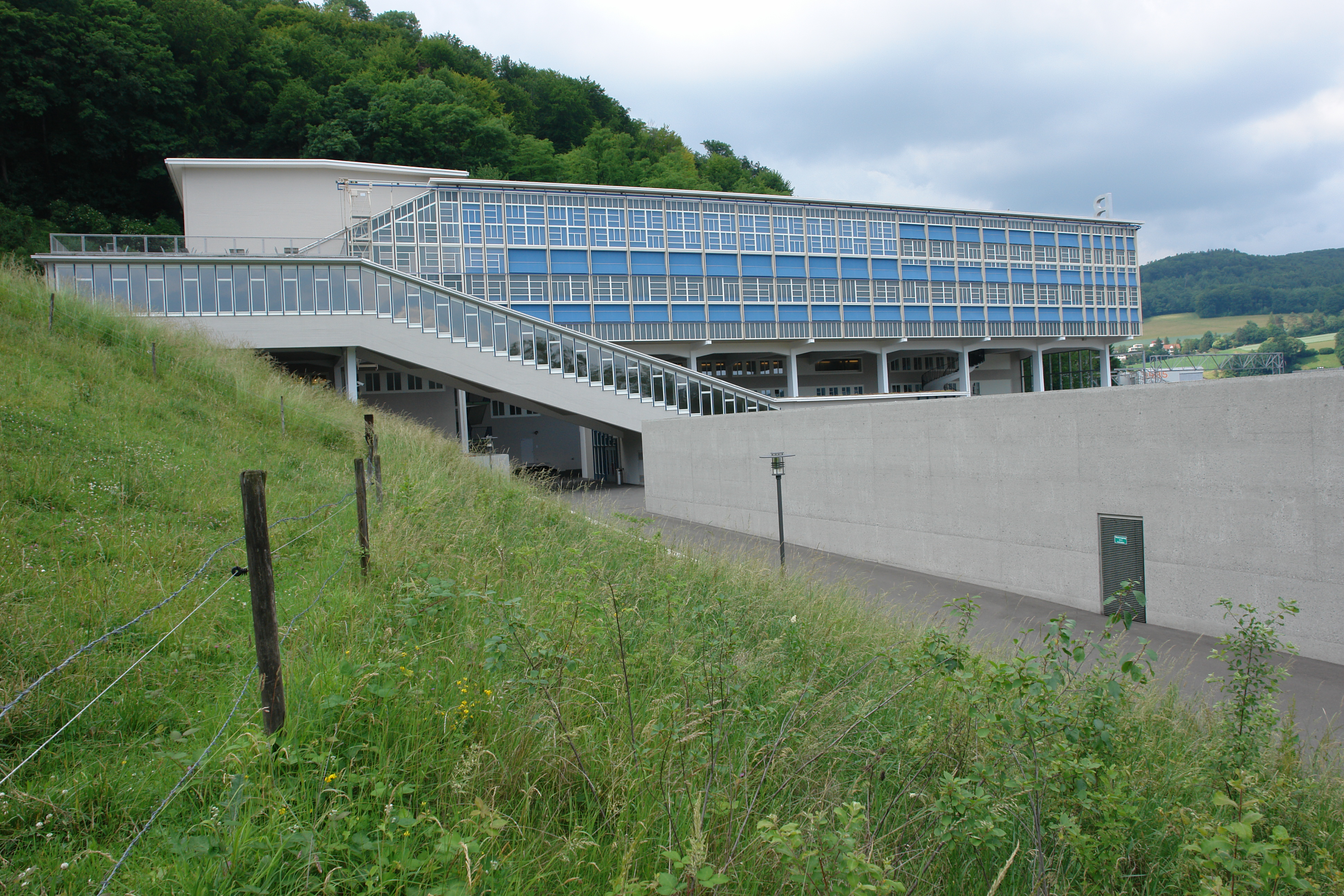 Gemeinschaftshaus der ABB, Baden Architekt: Armin Meili